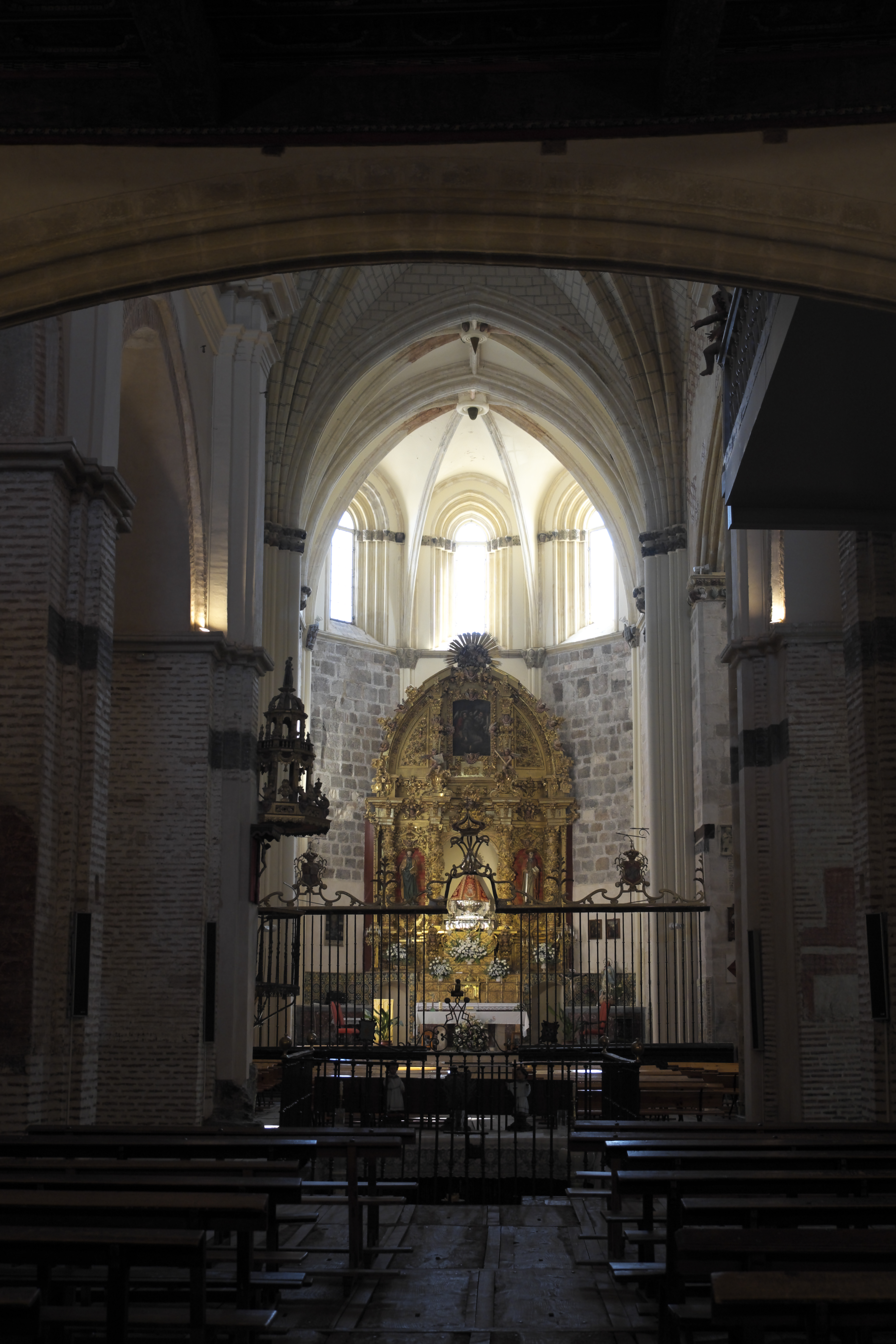 Katholische Pfarrkirche Nuestra Señora de la Soterraña, Kirche des ehemaligen Dominikanerklosters in Santa María la Real de Nieva in der Provinz Segovia (Kastilien-León/Spanien), Innenraum mit Blick zum Chor